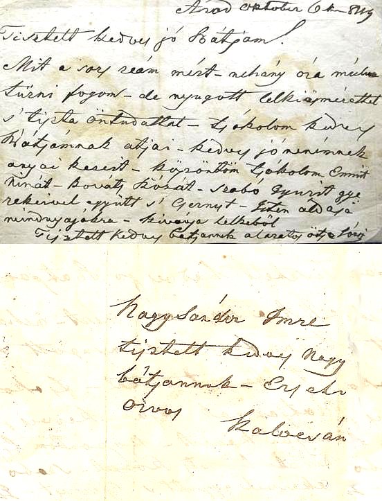 Nagysándor József vezérőrnagy, aradi vértanú nagybátyjához írt búcsúlevele